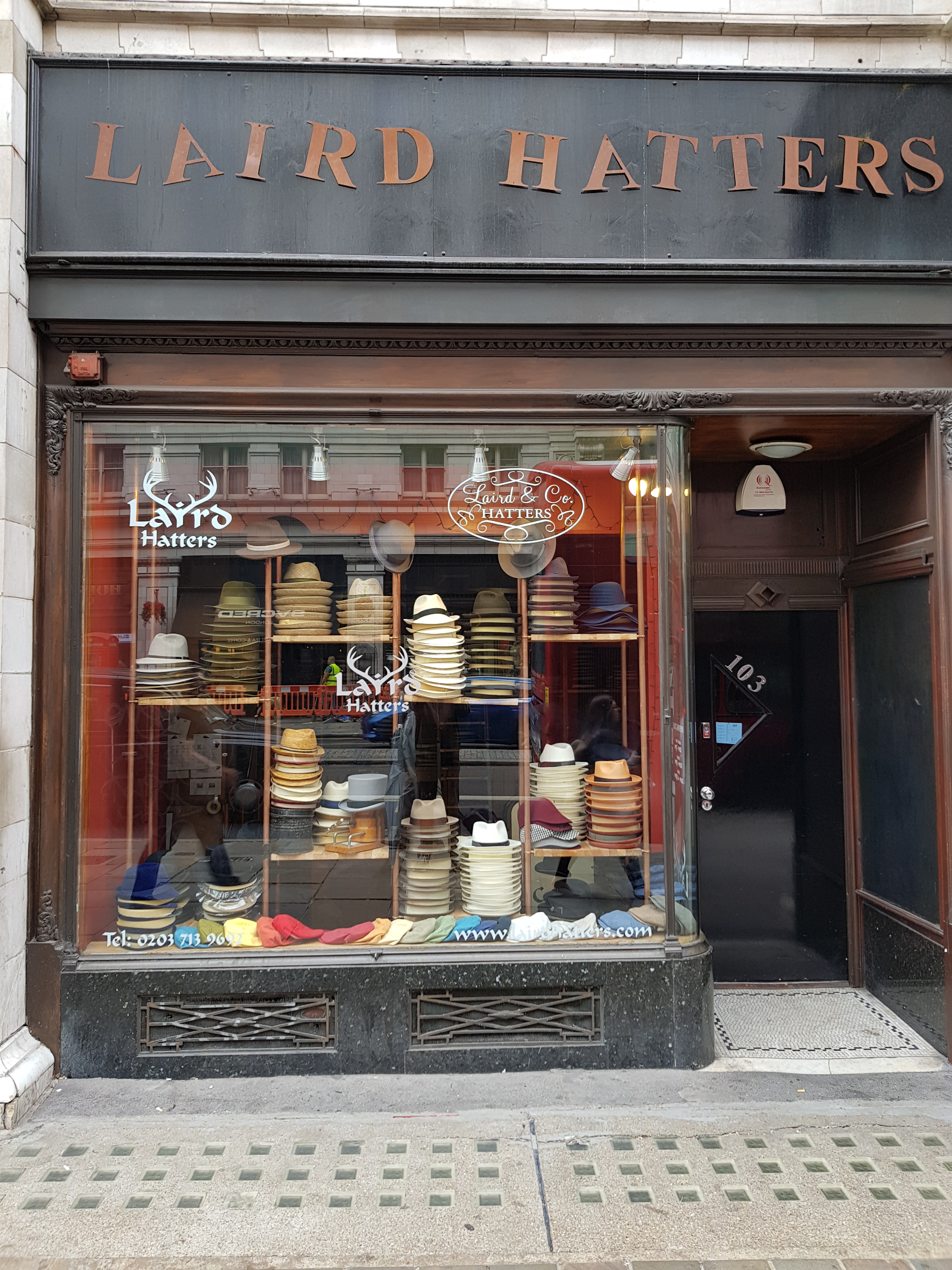 Boutique de chapelier sur le Strand, Londres.